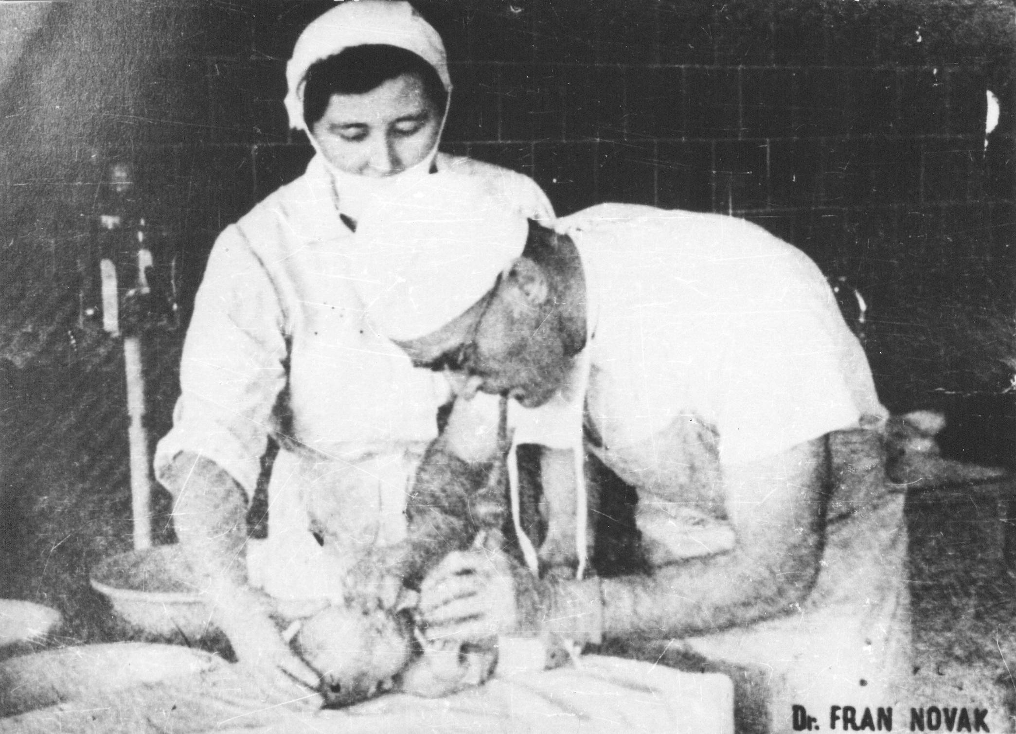 Partizanska porodnišnica